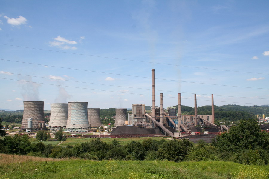 Tuzelska termoelektrarna